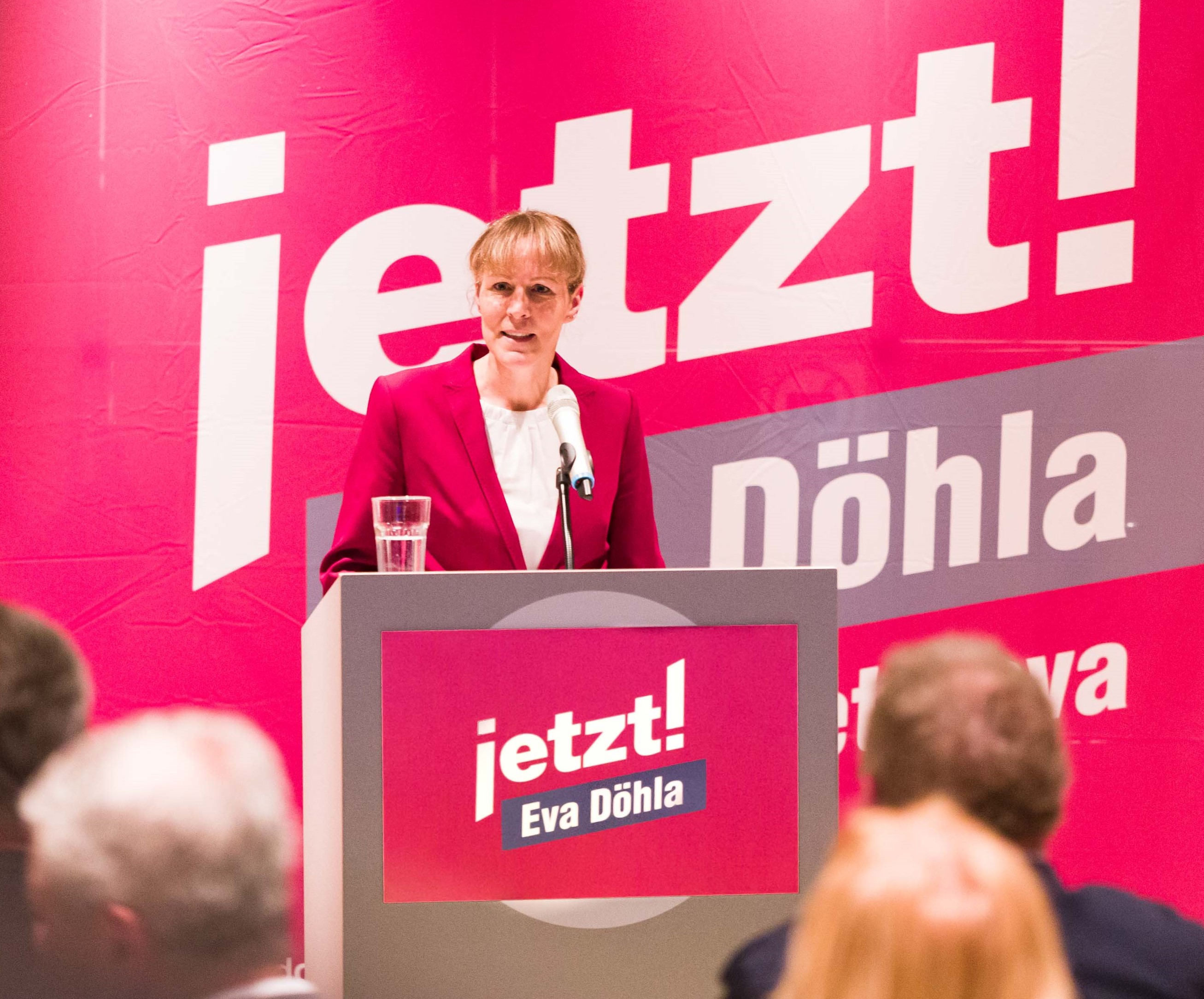 Ausgenommen im Theater